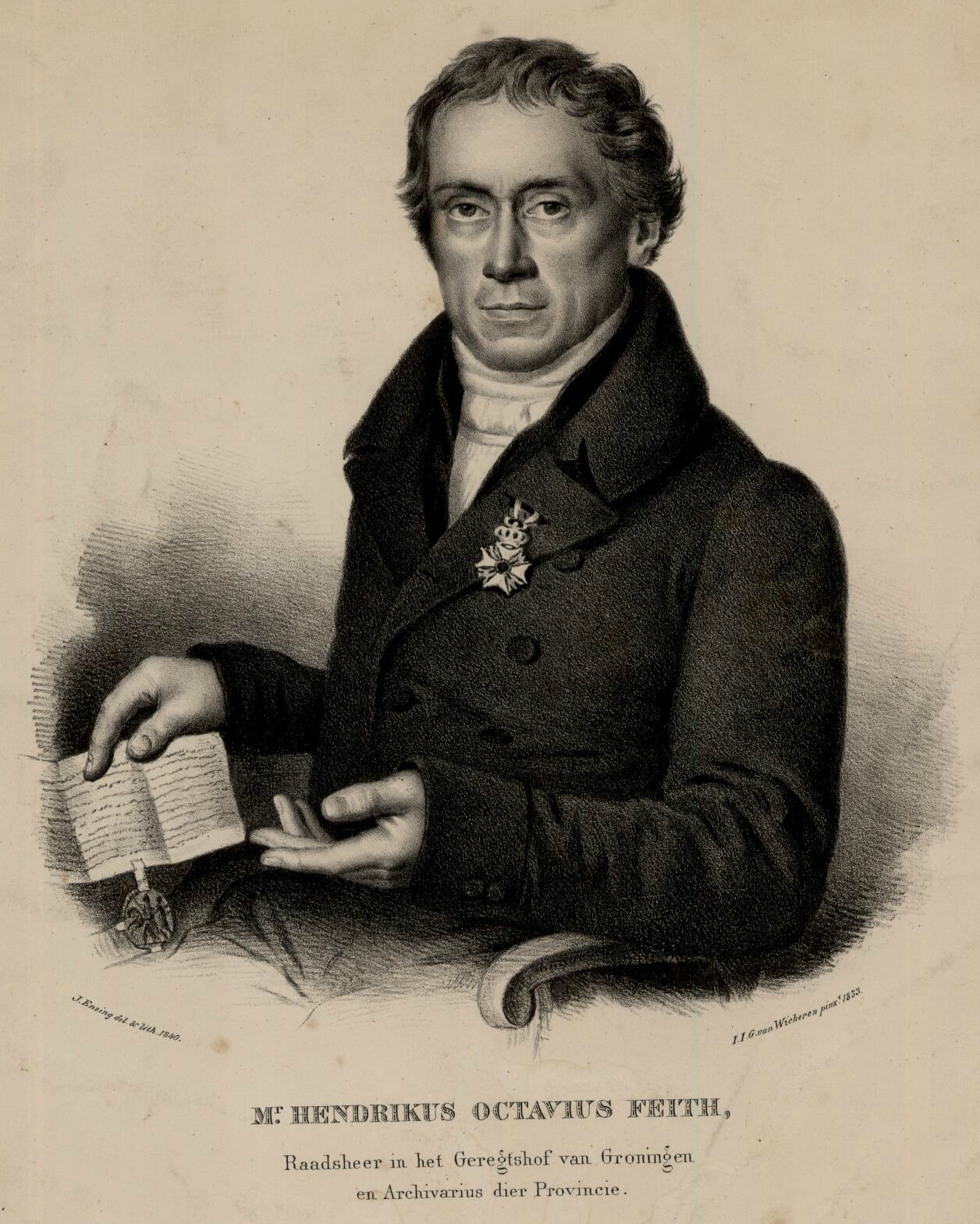 Lithografie van Hendrikus Octavianus Feith uit 1840 naar een schilderij van Johan Joeke Gabriël van Wicheren uit 1833